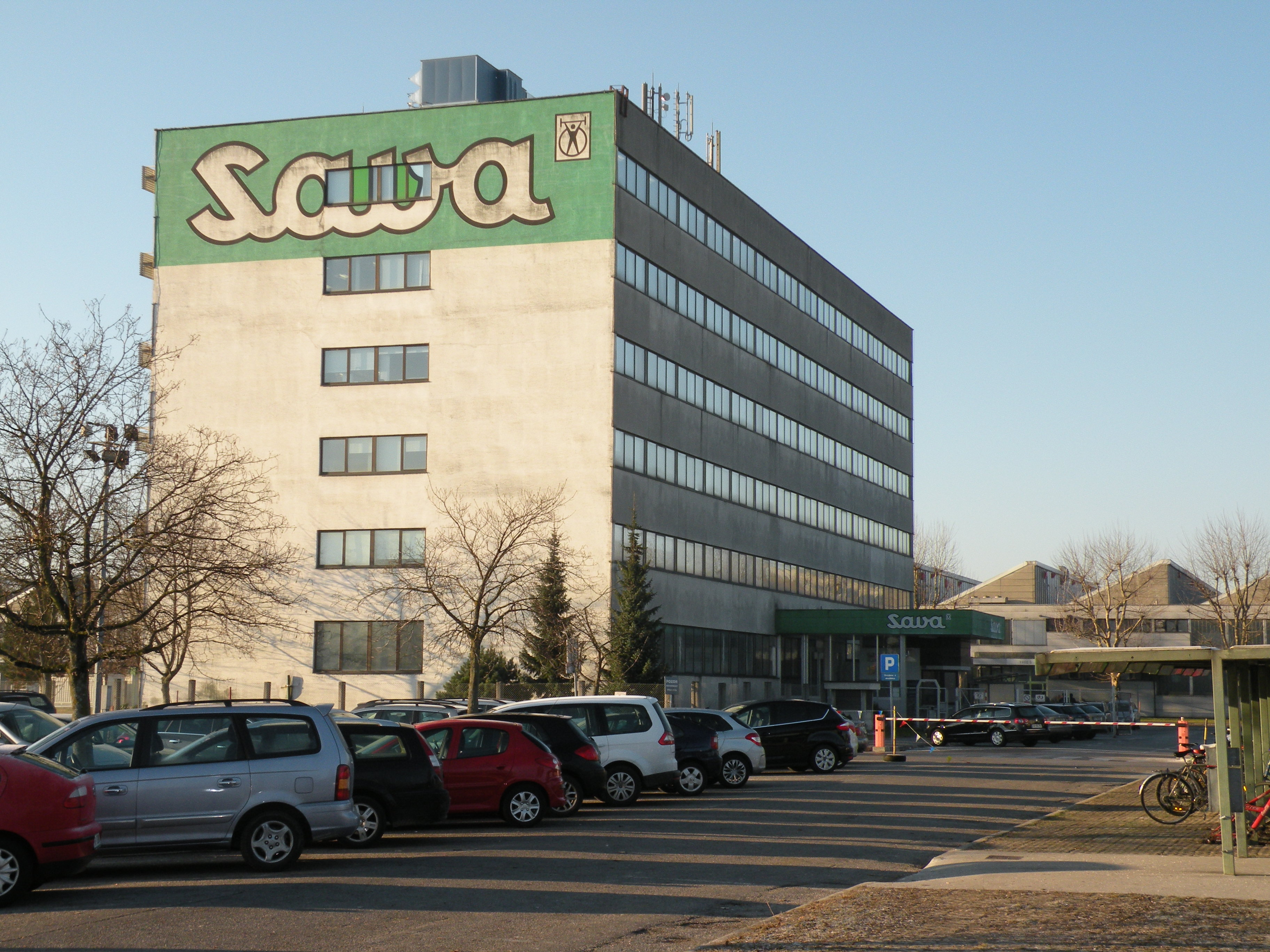 Tudi Sava Tires gre v Sloveniji v smeri Zero Waste